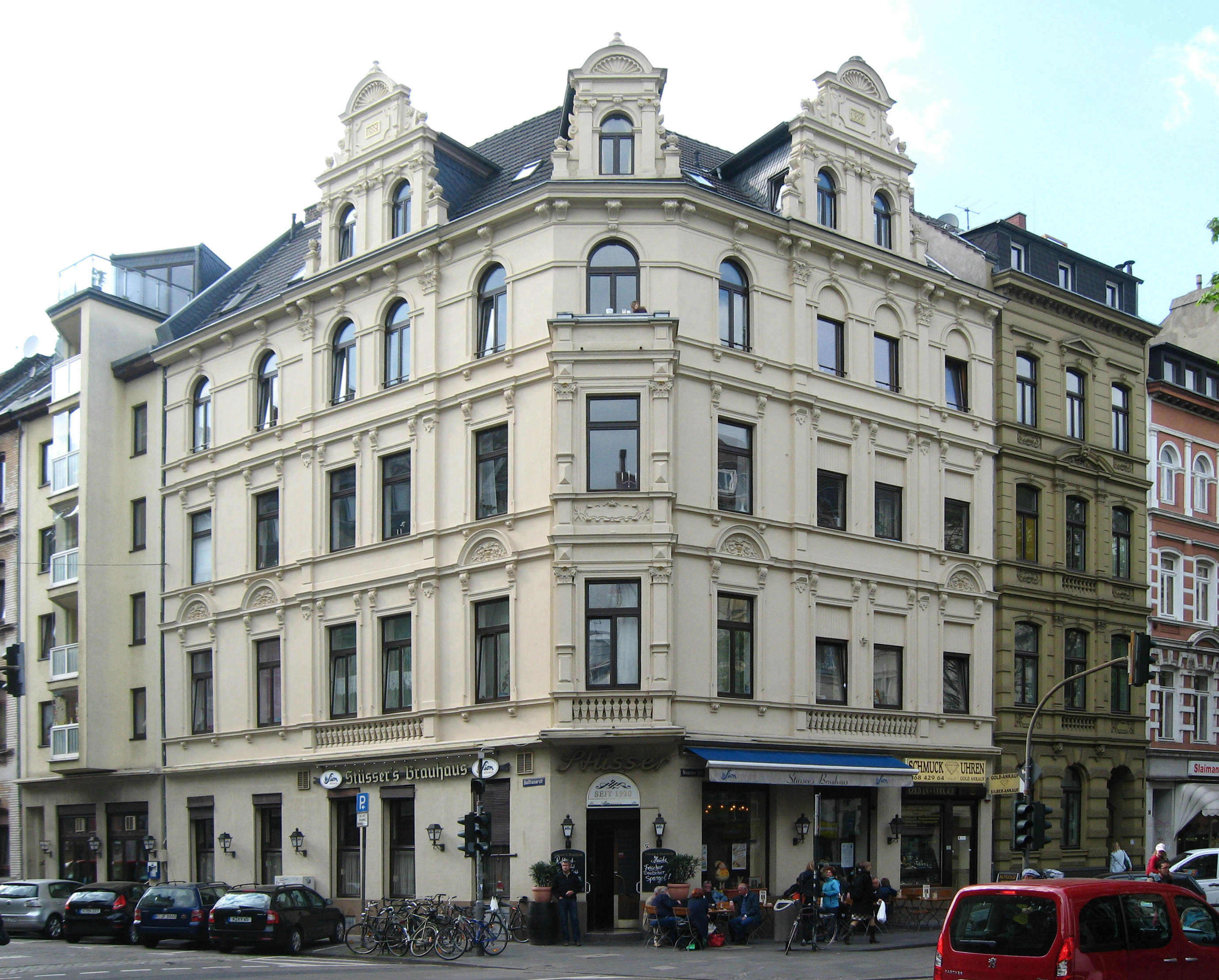 Brauhaus Stüsser, Köln - Agnesviertel Datum: 15.04.2011 Urheber: M. Pfeiffer alias Benutzer:Gordito1869 Quelle: privates Fotoarchiv des Urhebers